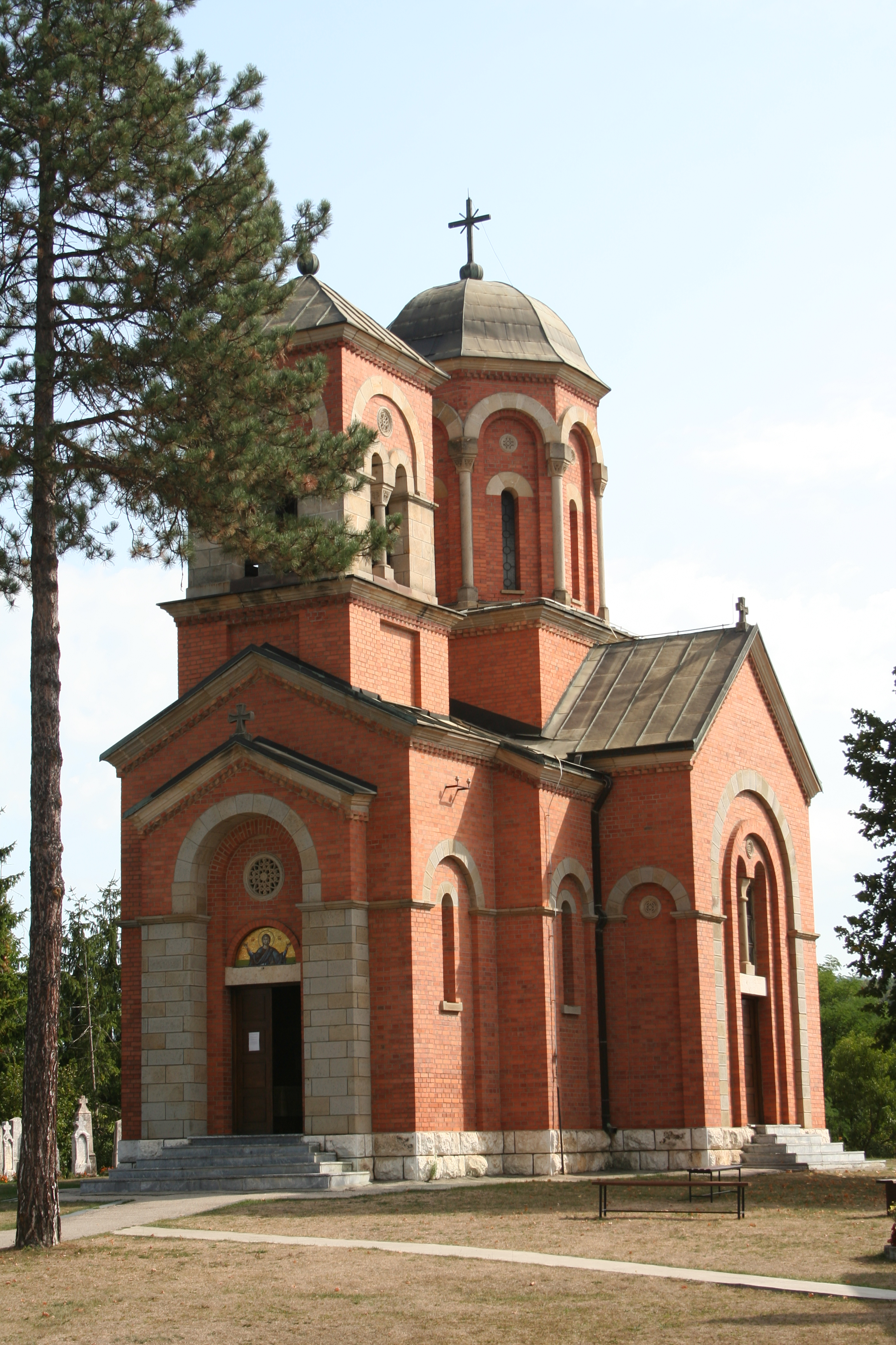 Crkva Rođenja Presvete Bogorodice u Kosjeriću